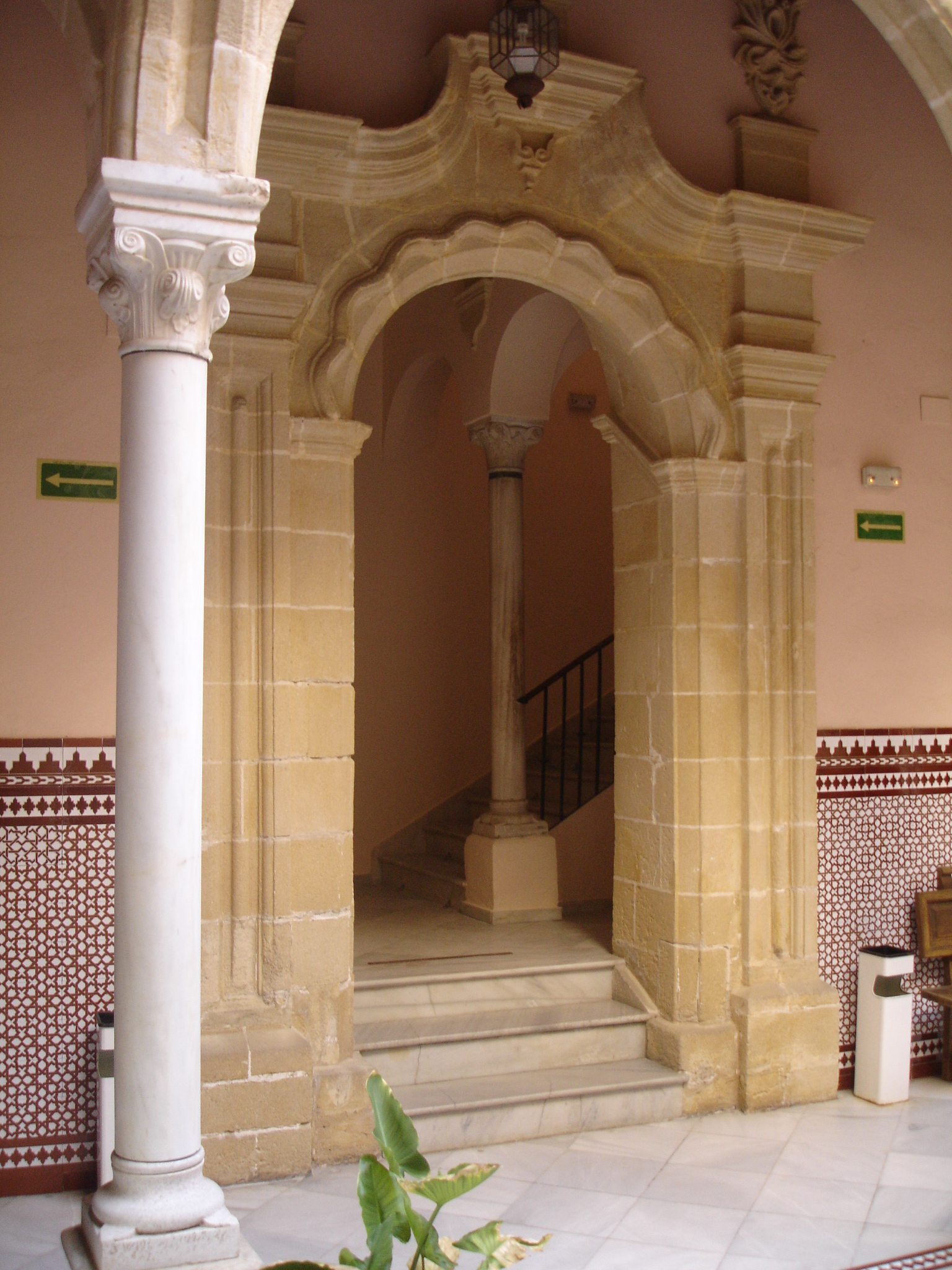 Pemartín Palace, Jerez de la Frontera, Andalusia (Spain) Pemartiín Palace, Jerez de la Frontera